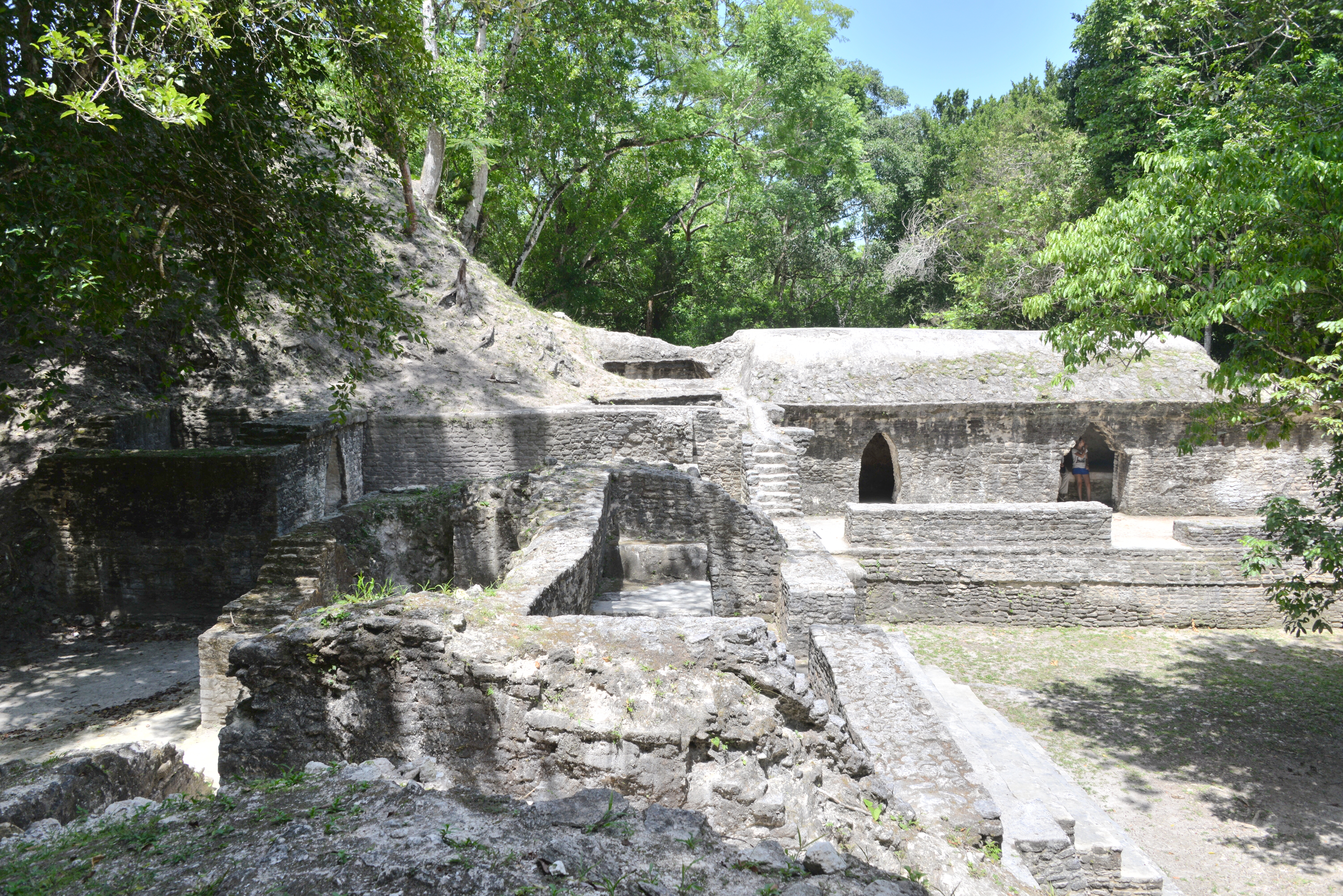 belize